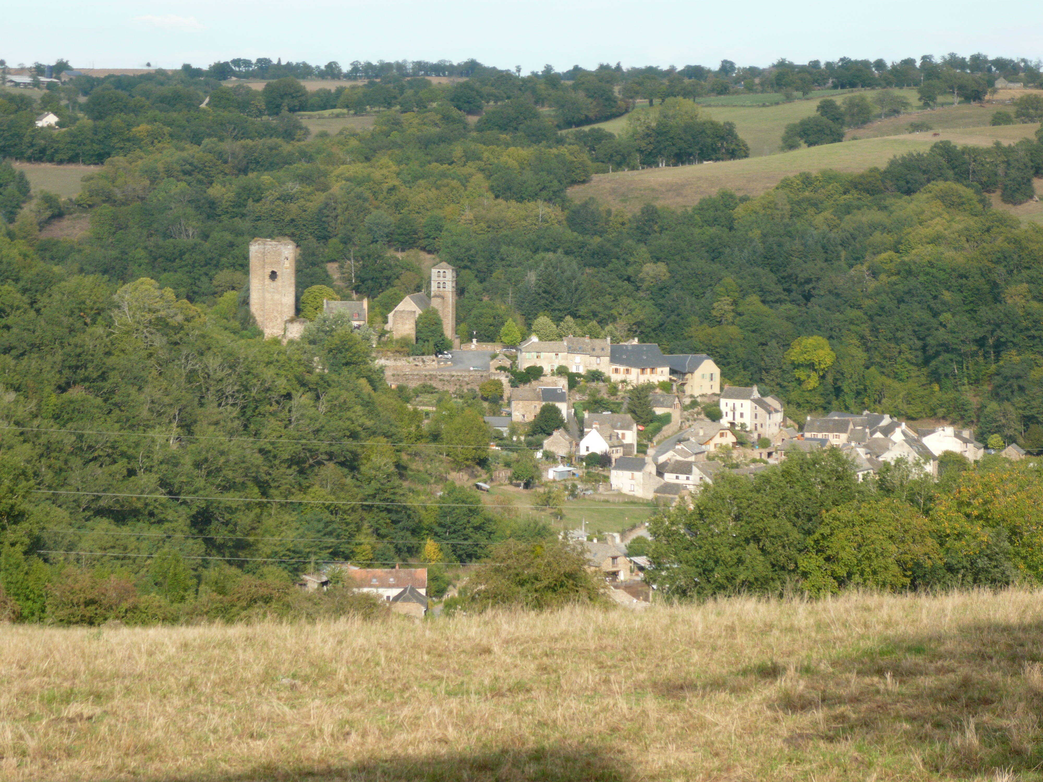 Vue générale de Calmont-de-Plancatge (Aveyron)